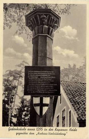 Die Vierbrüdersäule in Ostpreussen